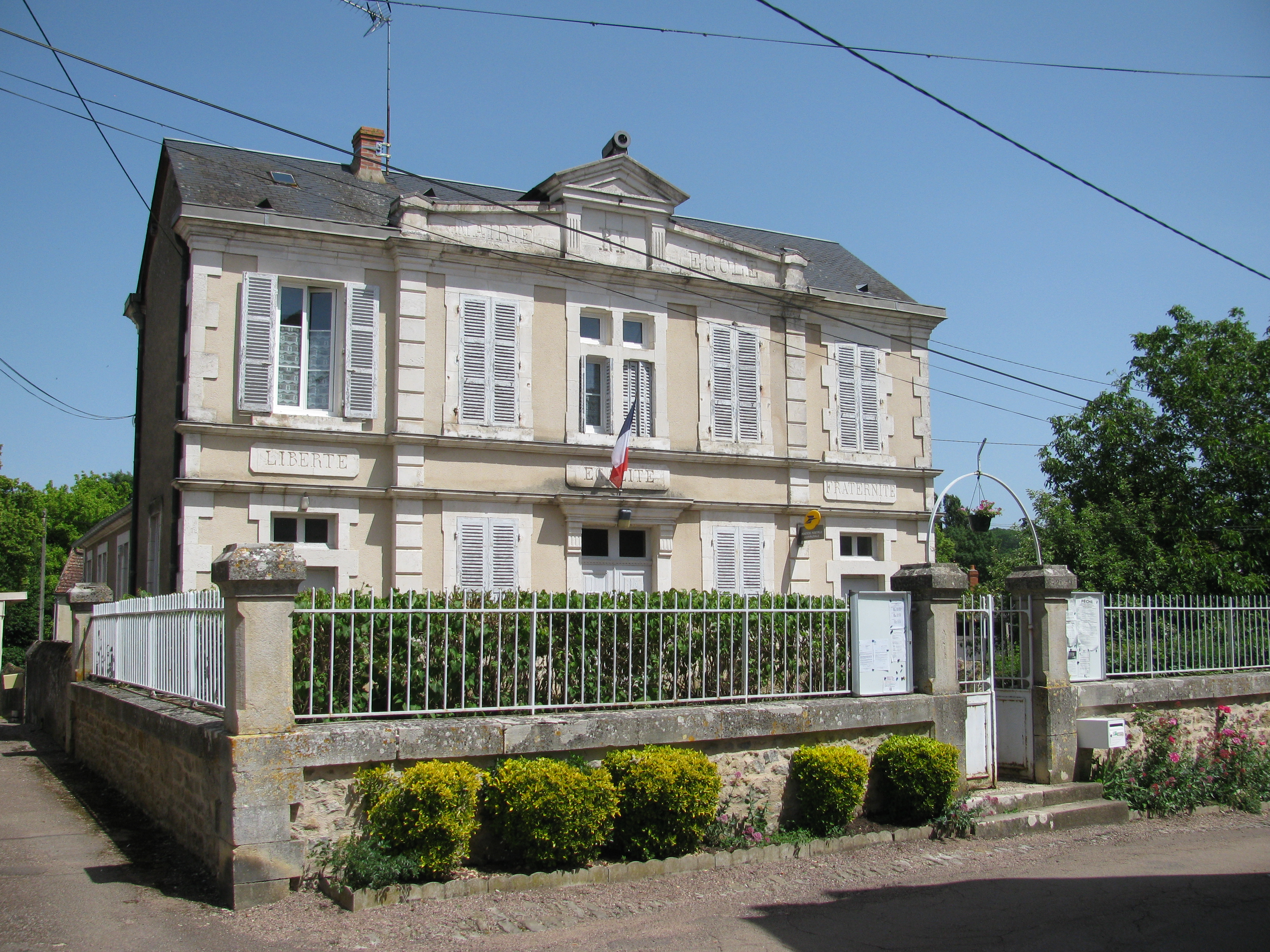 La mairie de Monceaux-le-Comte, Nièvre, France.